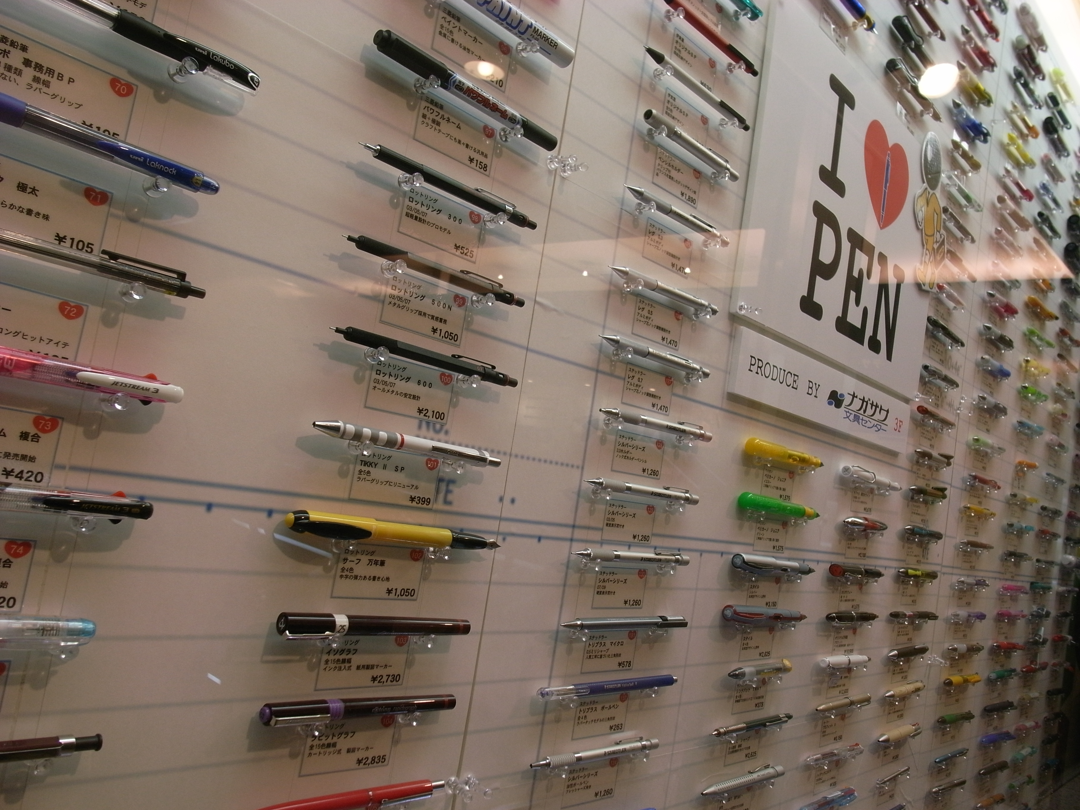 ナガサワ文具センター